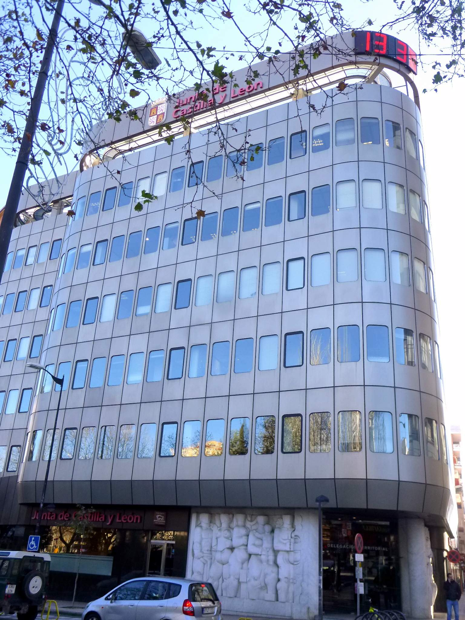 Zamora - Antigua sede de la Caja de Ahorros Provincial de Zamora (hoy, oficinas de la Junta de Castilla y León)